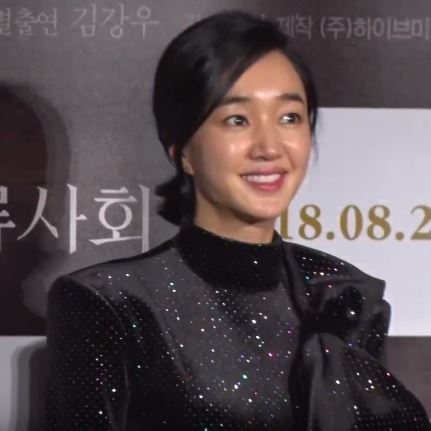 디스패치 구독 클릭! Dispatch Subscribe